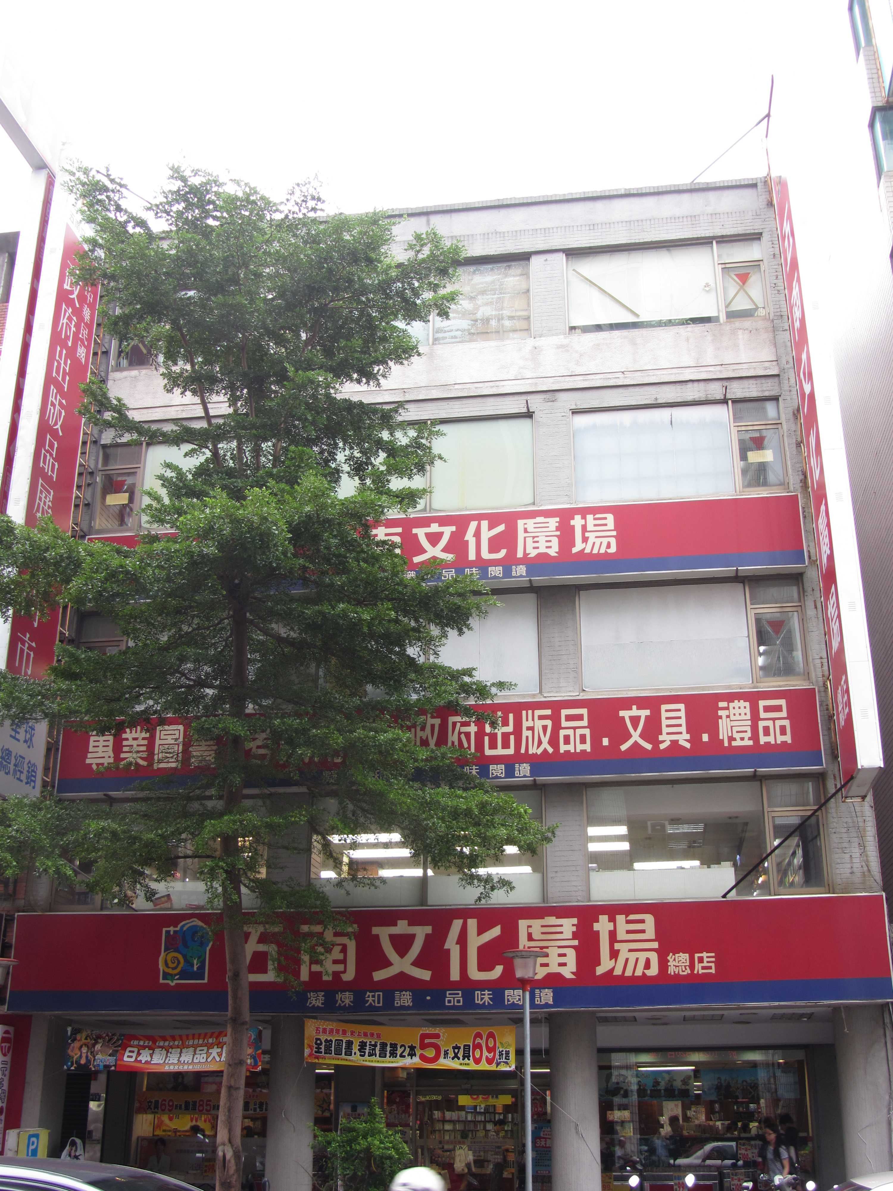 五南文化廣場台中總店，位於臺灣臺中市中區中山路6號